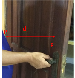 contoh momen dalam kehidupan sehari-hari